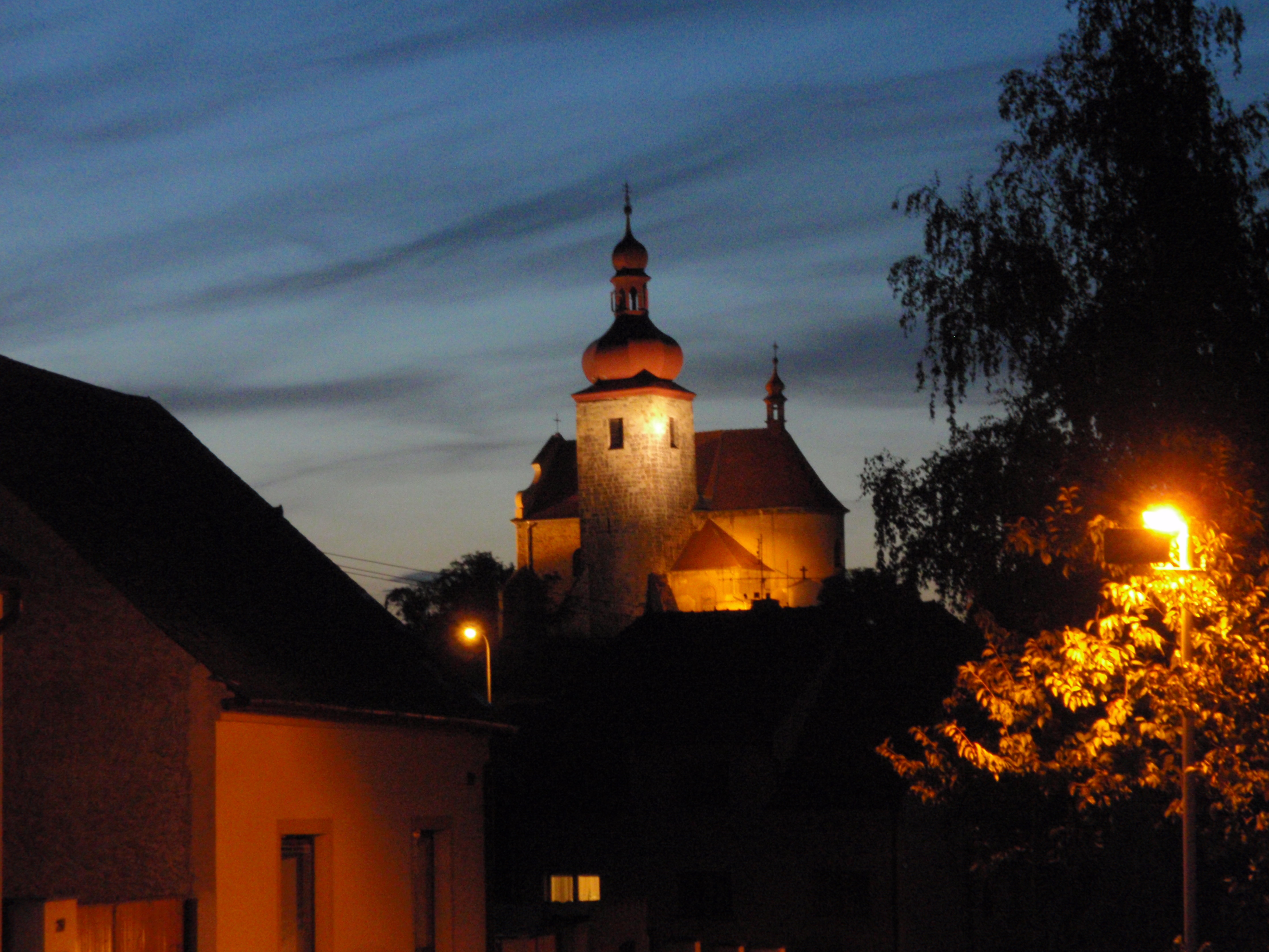 Večerní kostel,Černčice